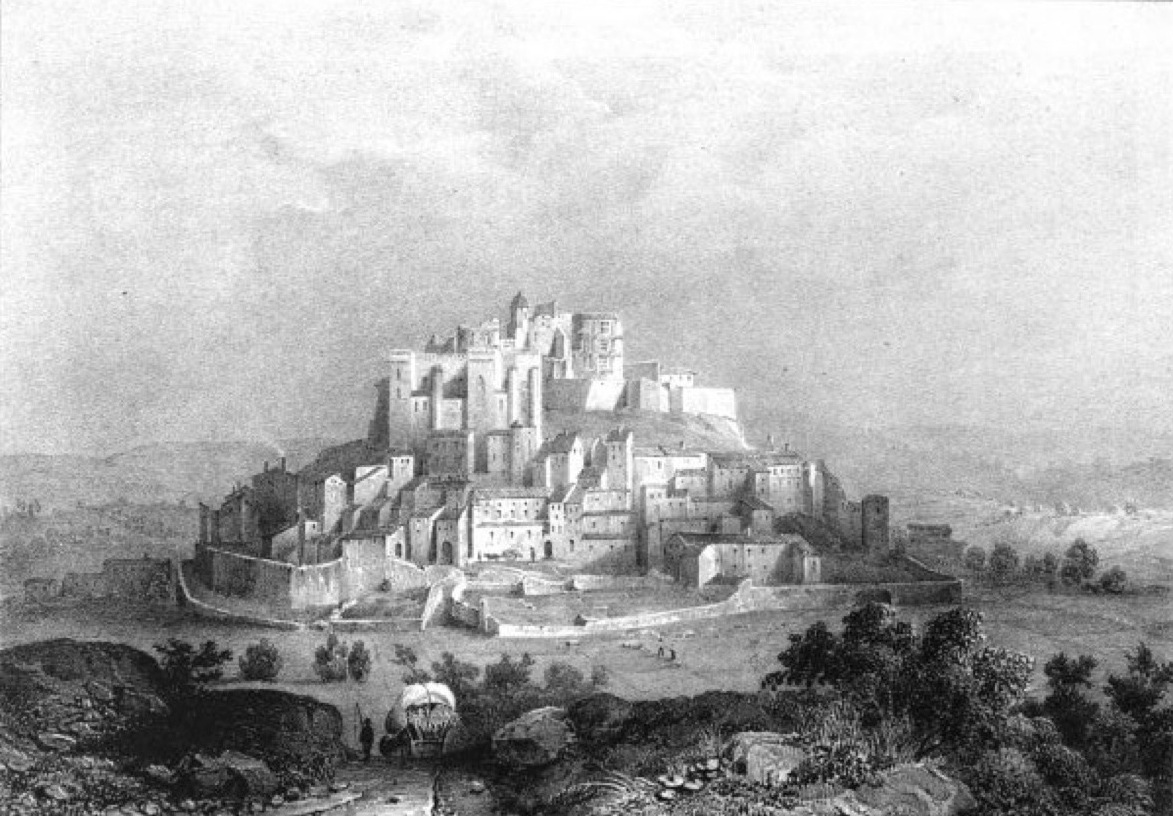 Album du Dauphiné - tome IV, litographie de Grignan, Drome